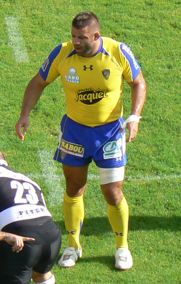 Le rugbyman international français Lionel Faure affronte le CA Brive avec l'ASM Clermont Auvergne au stade Marcel Michelin de Clermont-Ferrand